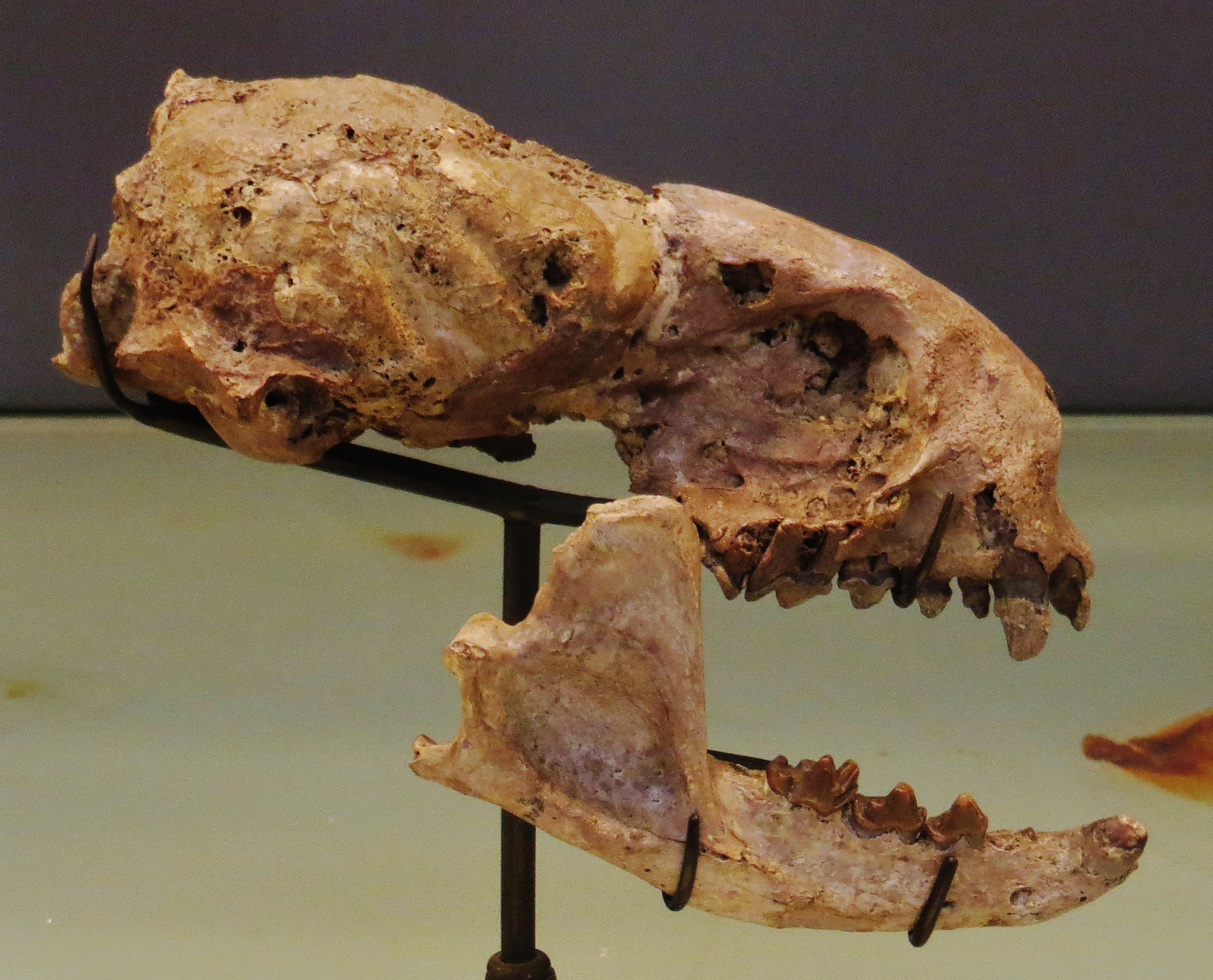 Potamotherium valetoni fossil